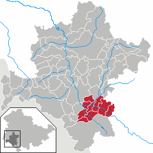 Verwaltungsgemeinschaft Salzbrücke in Thuringia - District Schmalkalden-Meiningen